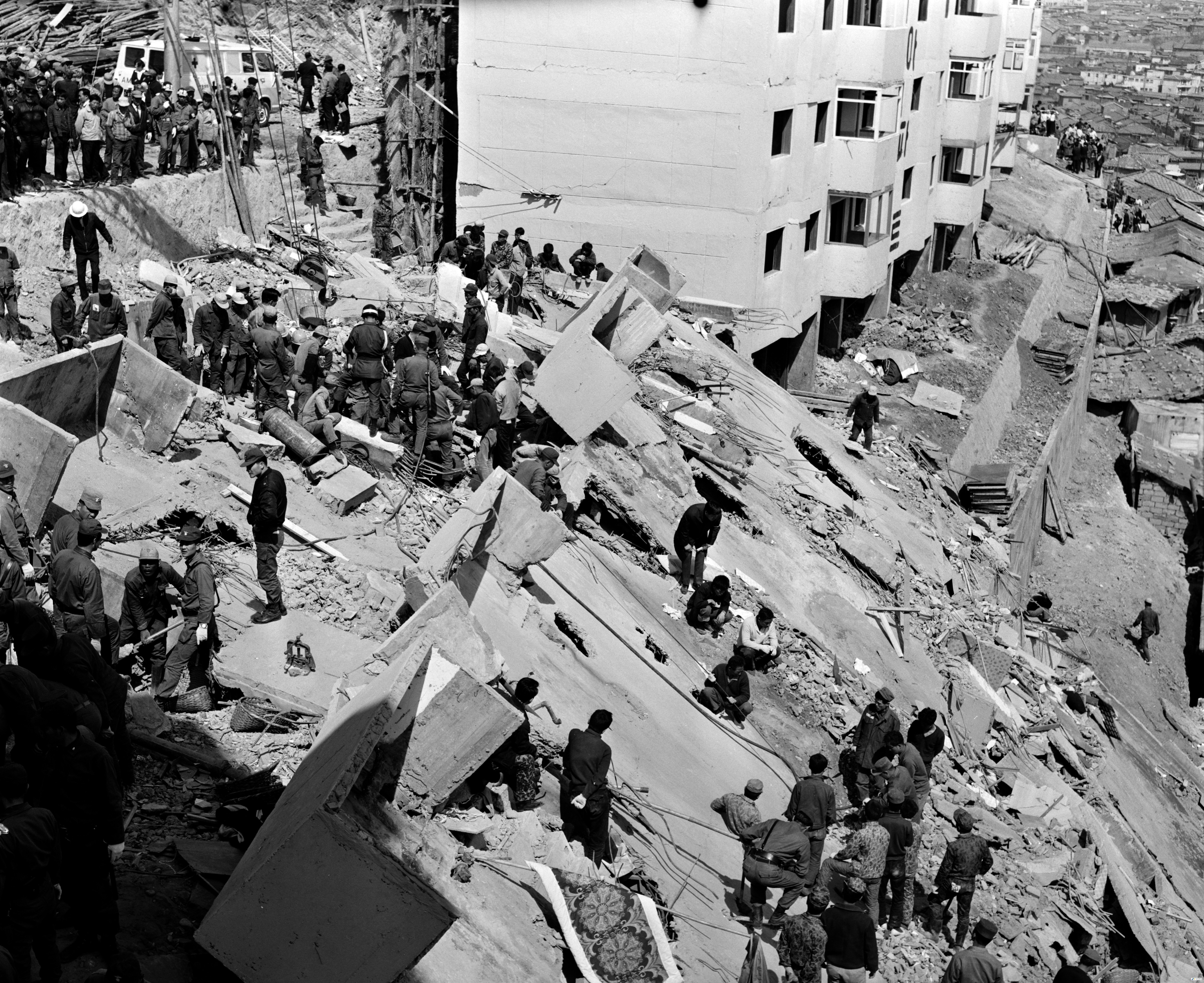 서울특별시 소방재난본부 소장 사진. photos of Seoul Metropolitan Fire & Disaster Headquarters. 이 파일은 크리에이티브 커먼즈 저작자표시-동일조건변경허락 4.0 국제 라이선스로 배포됩니다. 단 누구인지 구별 가능한 특정 인물이 사진에 포함되어 있을 경우 사용 전에 서울특별시 소방재난본부 및 해당 인물의 승인을 받으셔야합니다. 감사합니다. evidence of permission